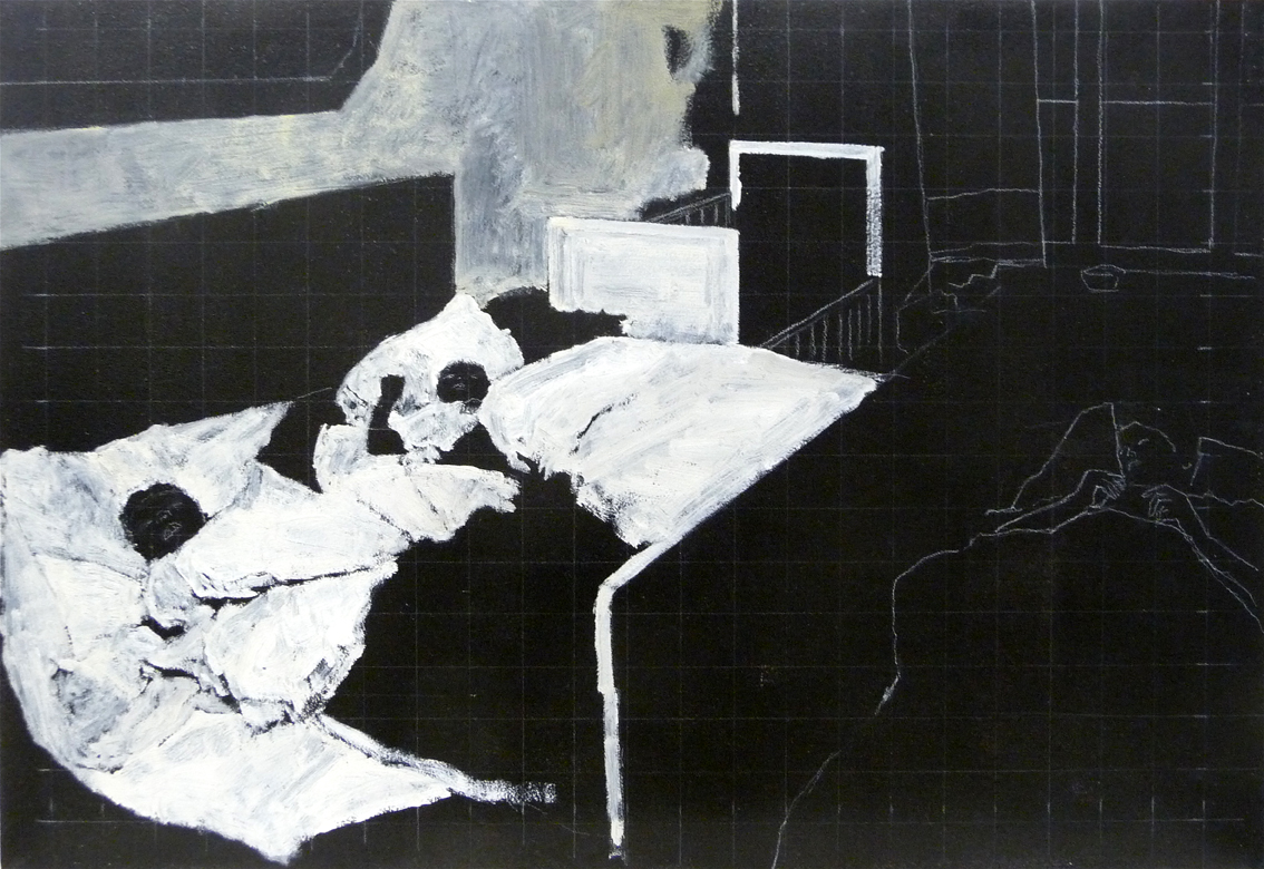 Heike Ruschmeyer, Lalelu 9, 2010, Kunstharz, Ölfarbe und Kreide auf MDF, 55 x 80 cm